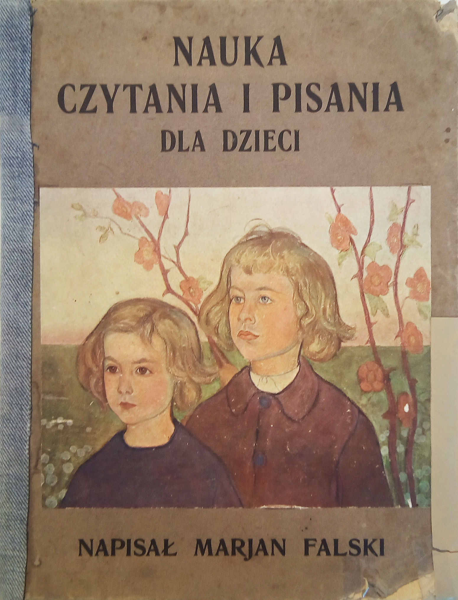 Okładka pierwszego wydania elementarza Mariana Falskiego, wydanie z 1910 roku z ilustracjami Jana Rembowskiego